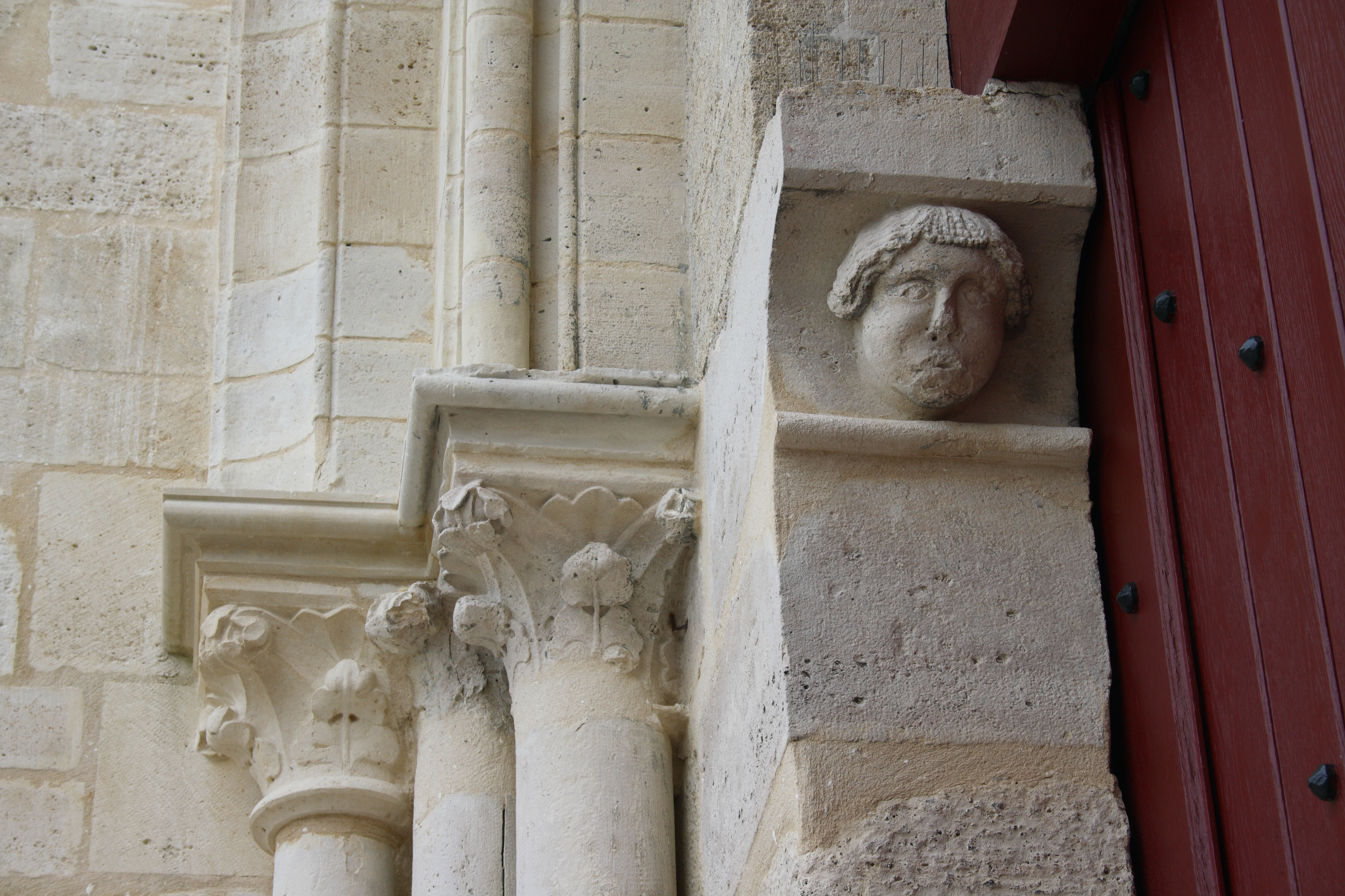 Kathedrale Saint-Spire in Corbeil-Essonnes im Département Essonne (Île-de-France), Kapitelle am Westportal